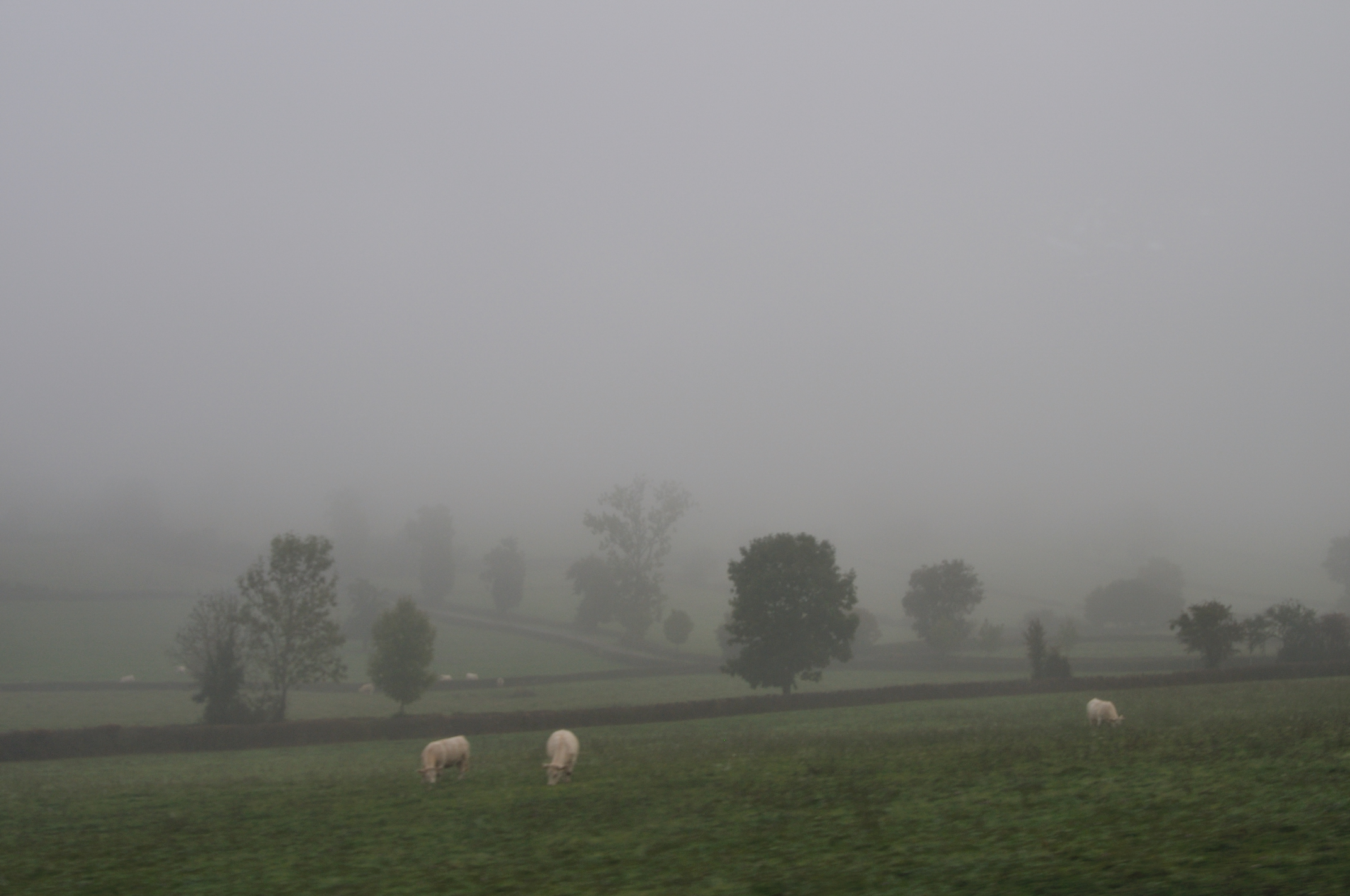 Paysage du Charolais-Brionnais vu de la voie ferrée entre Paray-le-Monial et La Clayette, Saône-et-Loire, France